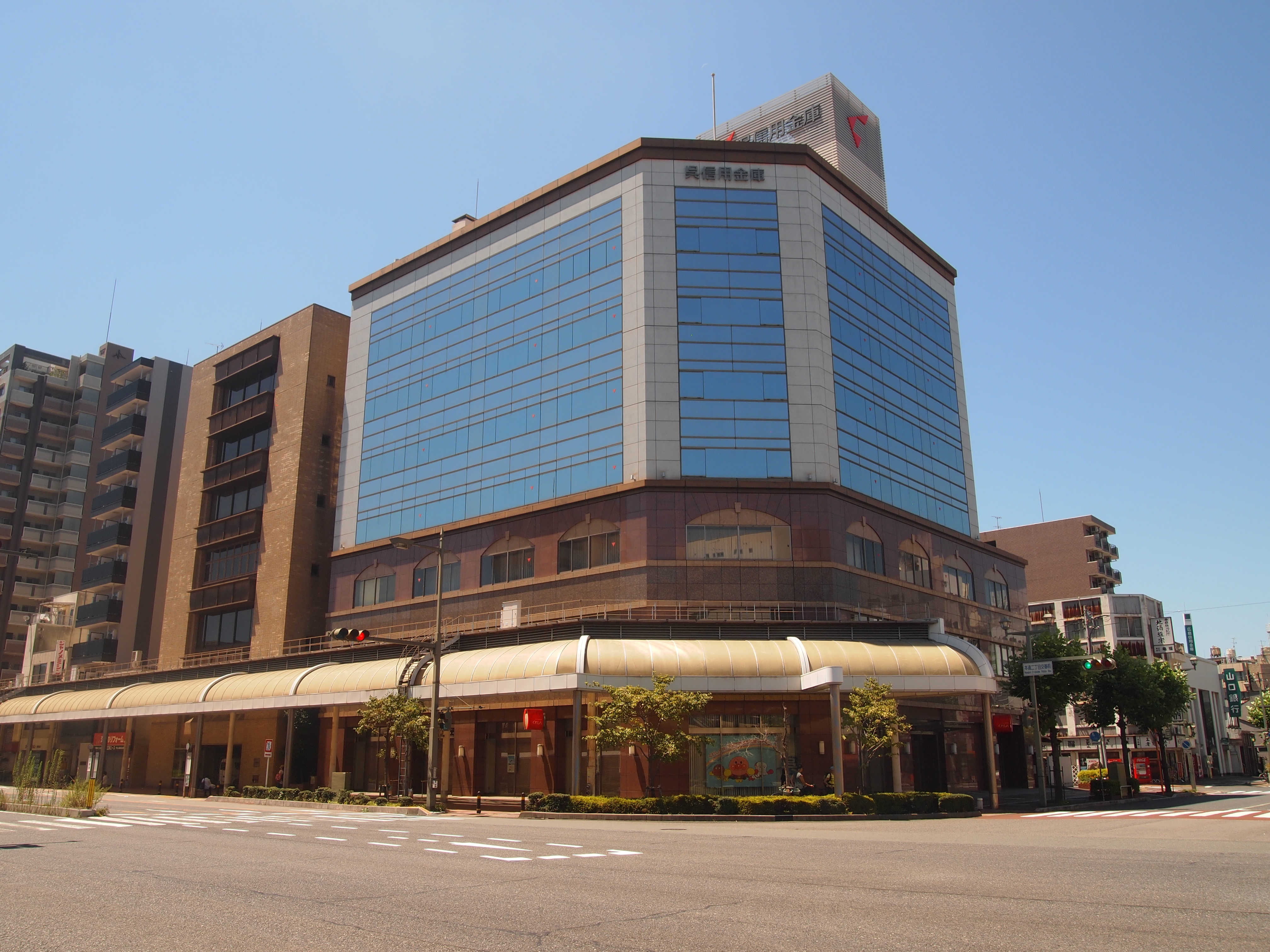 呉信用金庫